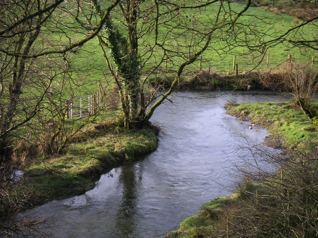 Clettwr Fawr, Pont-Siân, Ceredigion